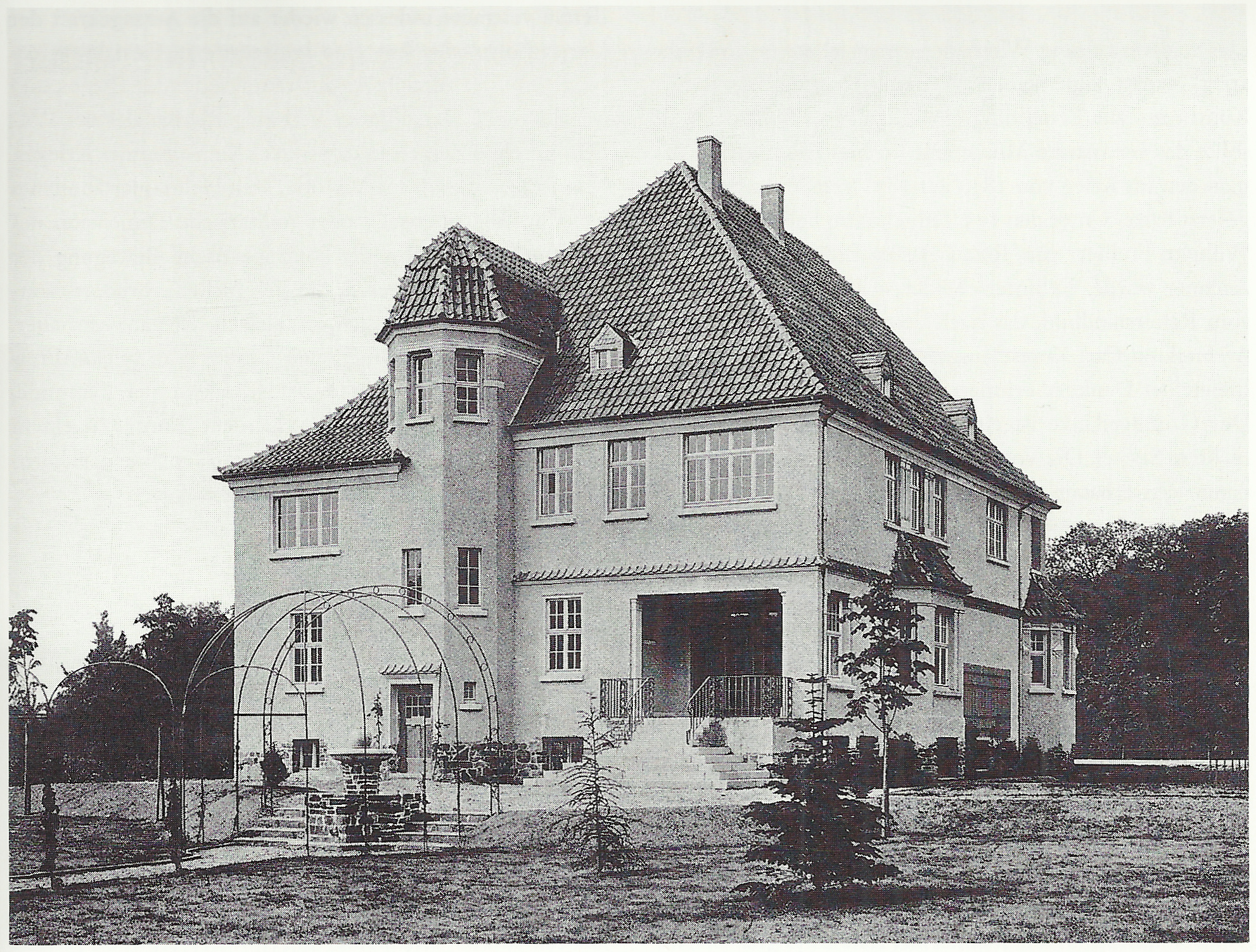 Landhaus von Kleist, Rhöndorfer Straße 87, Bad Honnef: Gartenansicht